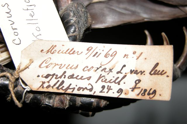 Pied Raven,registration, Zoologisk Museum. Copenhagen